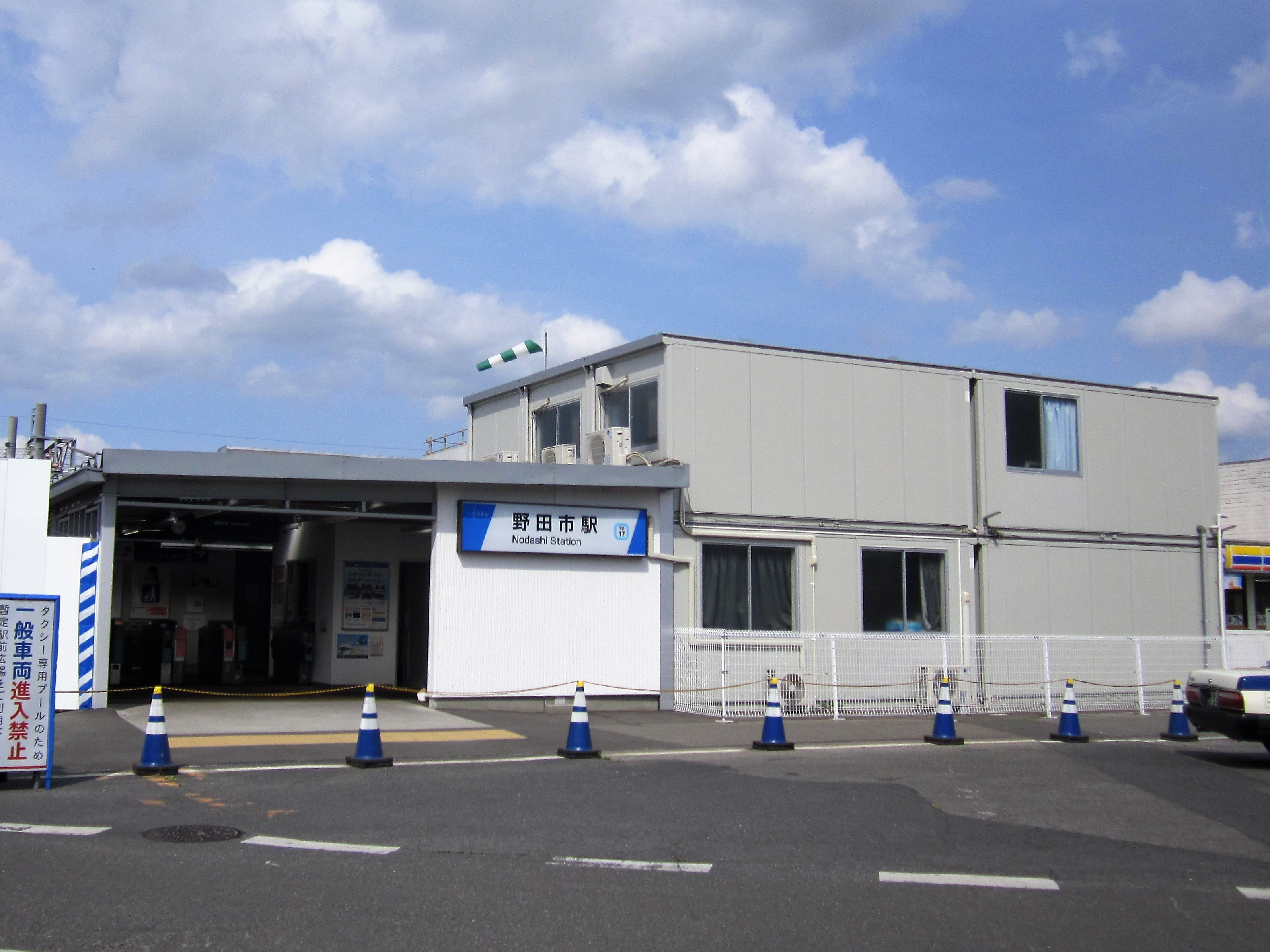 野田市駅の仮設駅舎 Canon PowerShot A2200